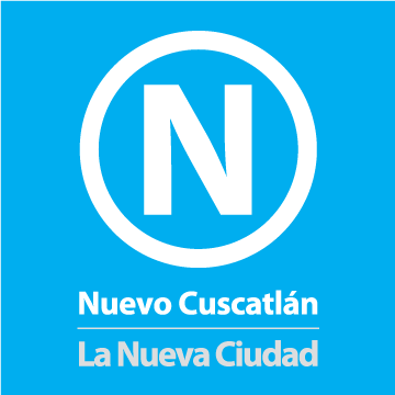 Logo de la Nueva Ciudad